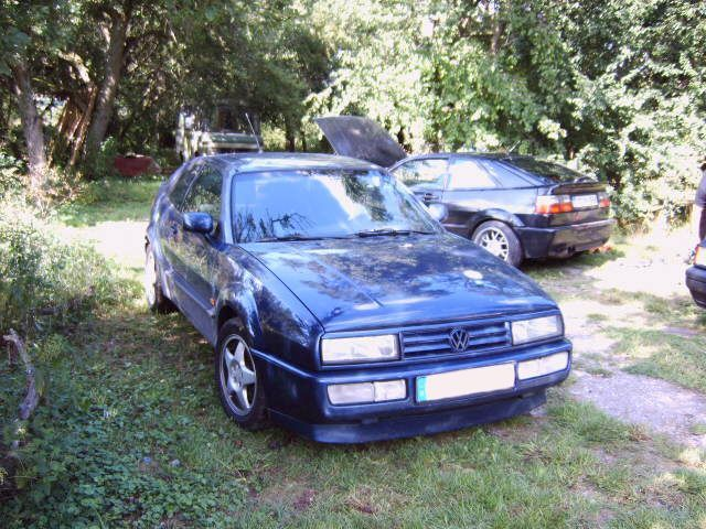 Abweichend zur Serie verfügt der hier abgebildete Corrado VR6 über einen lackierten Kühlergrill und eine Kamei Scheinwerferblende/-leiste. Die Rückleuchten des Corrado dahinter wurden ebenfalls nicht von Volkswagen angeboten *Beschreibung: Der VW Corrado VR6 *Quelle: selbst fotografiert/treffen.corradofreunde.de *Fotograf: A.Weber (Andy-Corrado/corradofreunde.de)